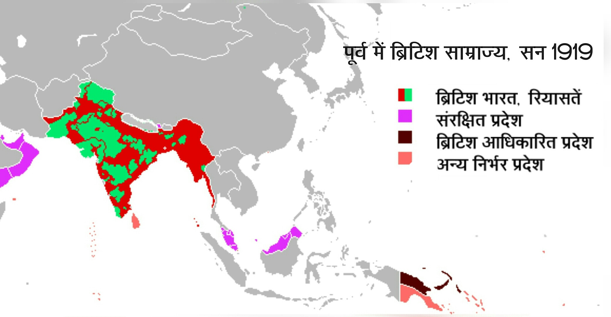 50px का हिंदी अनुवाद (Hindi translation of File:British_empire_in_east.png).